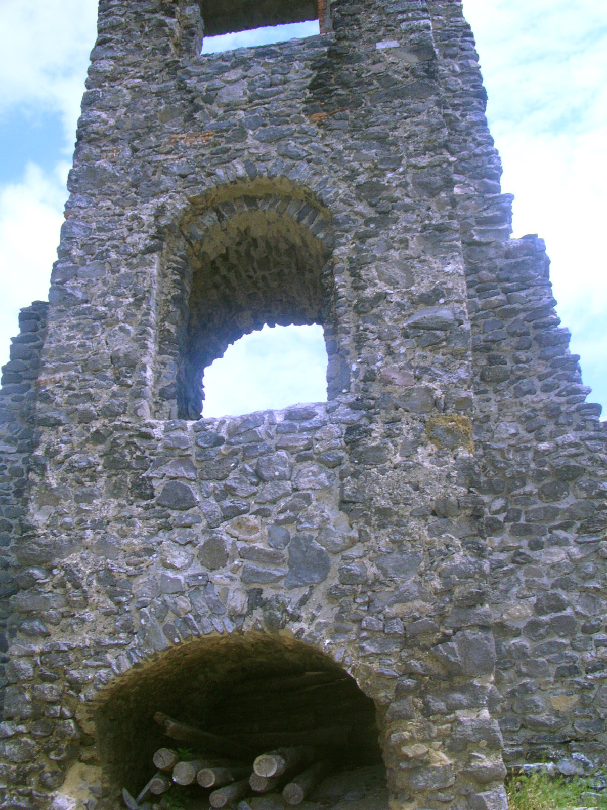 Témája: Somló várának tornya mai állapotában